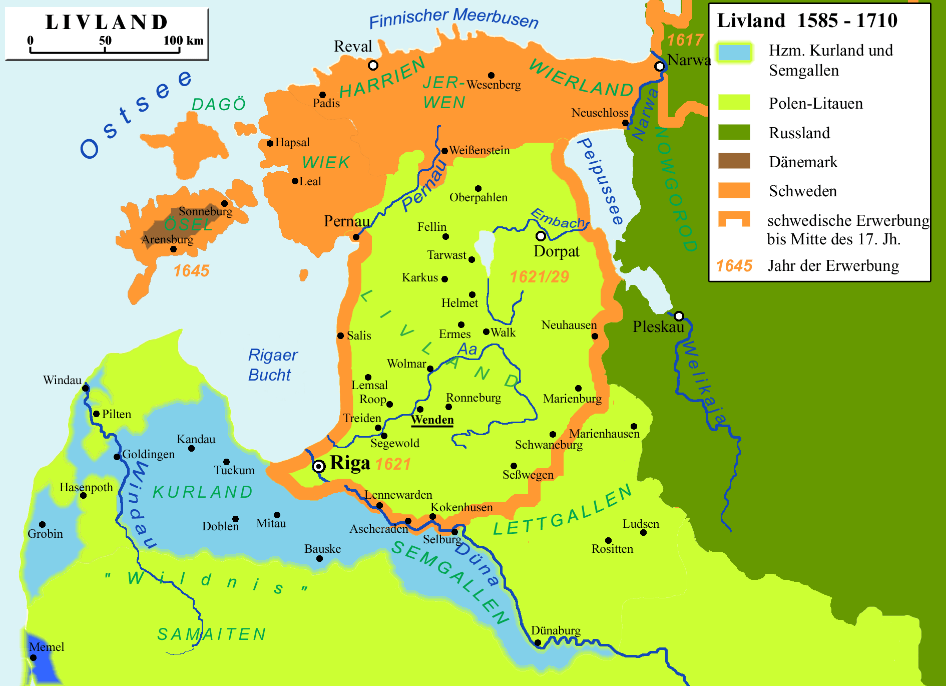 Eine Karte von Livland und den benachbarten Territorien, die die Entwicklung der Herrschaftsverhältnisse zwischen 1585 und 1710 zeigt